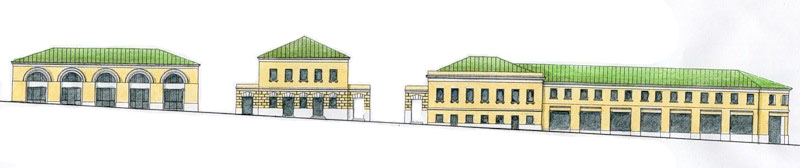 Первые торговые ряды с жилыми подворьями на Хитровской площади, построенные Николаем Захаровичем Хитрово до 1827 года.